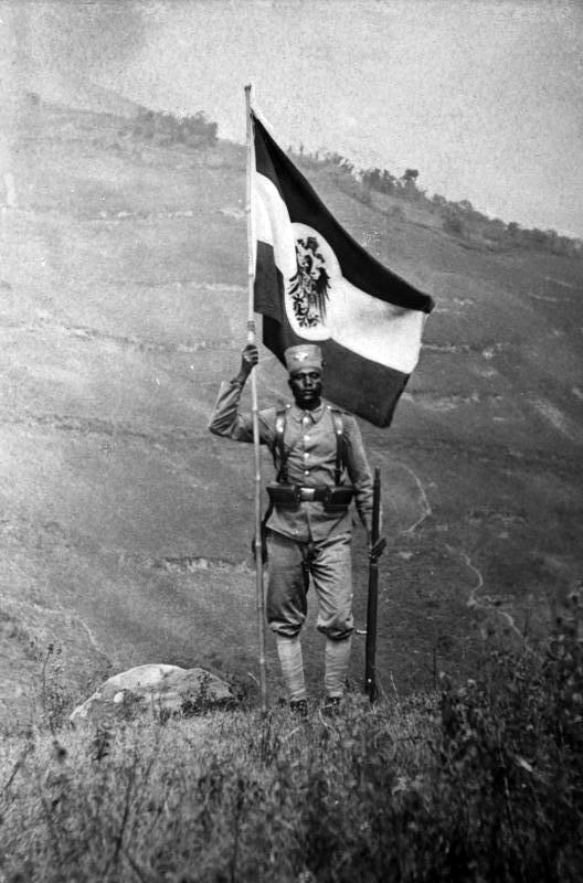 Fahnenträger